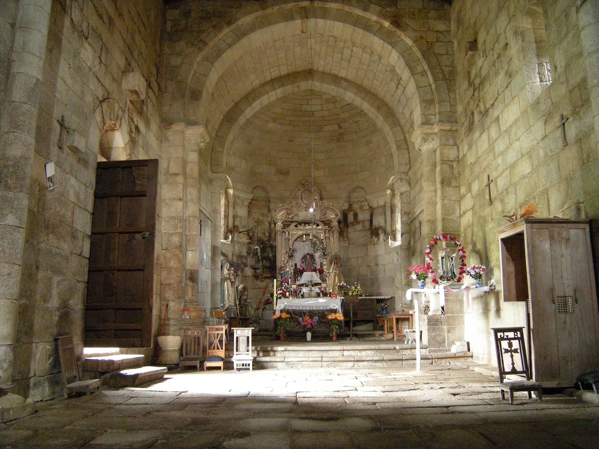 Vista de la iglesia desde el coro.